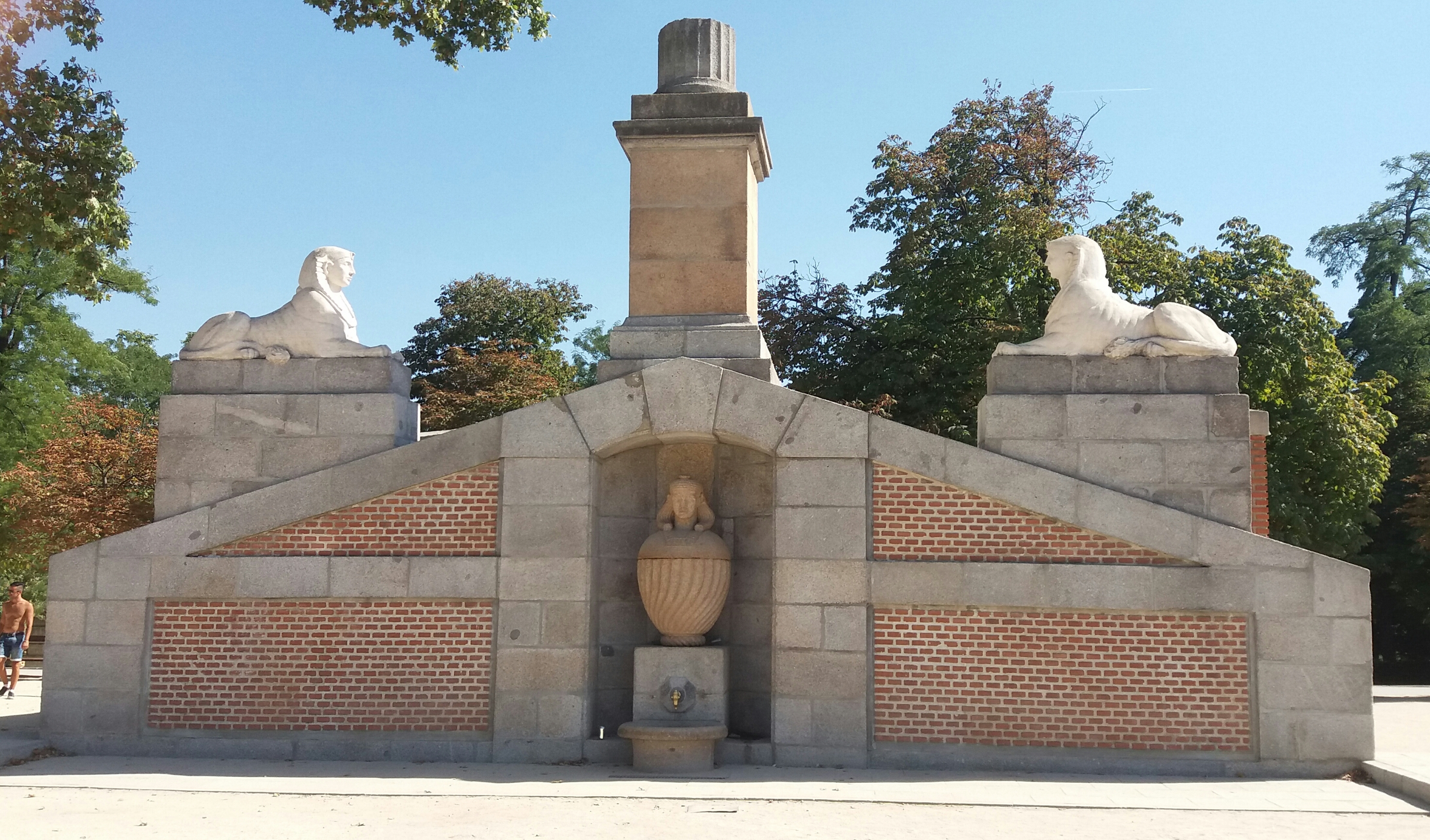 Fuente Egipcia, proyectada por Isidro González Velázquez en 1817. Se encuentra en Madrid (España), en la orilla sur del Estanque Grande del Parque del Retiro.